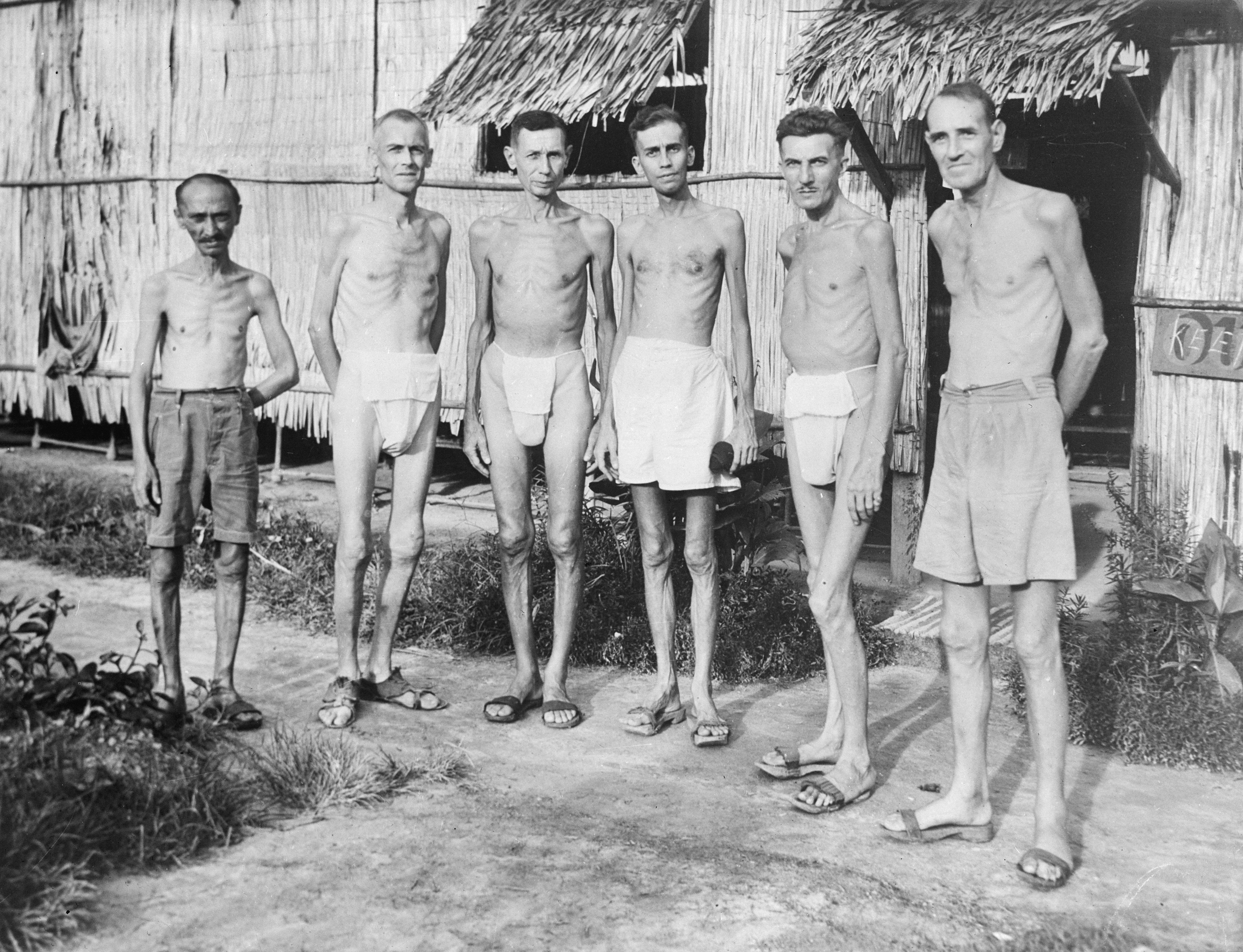 Foto van mannen in een Japans interneringskamp gemaakt in maart 1945. Het is onduidelijk of deze foto voor of na de bevrijding is genomen. Tijdens de Tweede Wereldoorlog werd toenmalig Nederlands-Indië bezet door Japan, krijgsgevangenen en burgers werden onder zeer slechte omstandigheden opgesloten in interneringskampen.